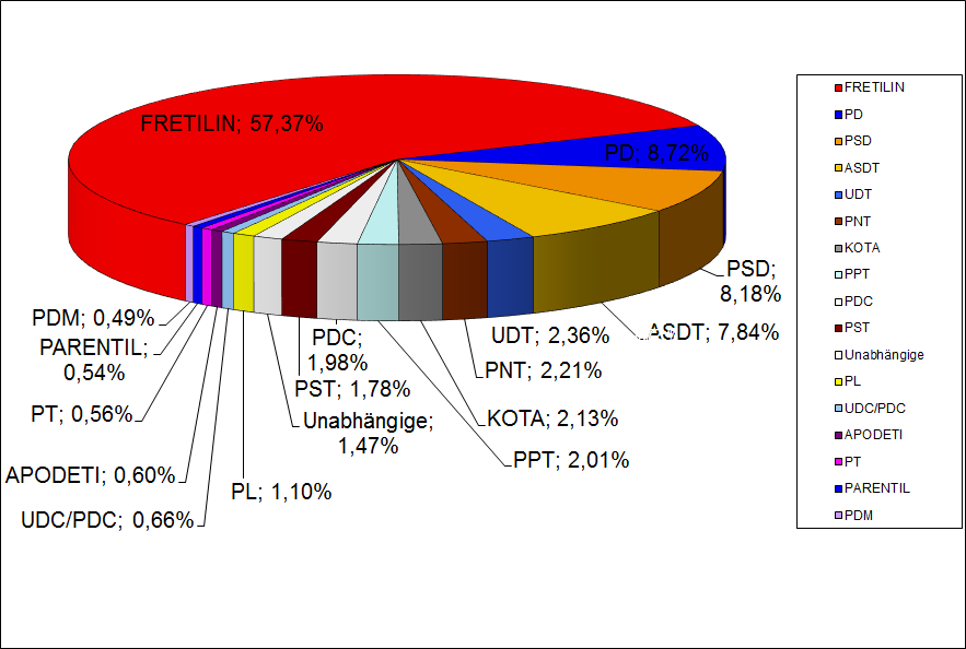 Ergebnis der Wahlen zur Verfassunggebenden Versammlung in Osttimor 2001